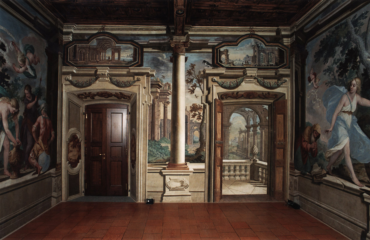 Stanza della Fortuna a Villa Frisiani Mereghetti di Corbetta (MI) - Italy. Gli affreschi sono di Giovanni Stefano Danedi, detto il Montalto (metà del XVII secolo)